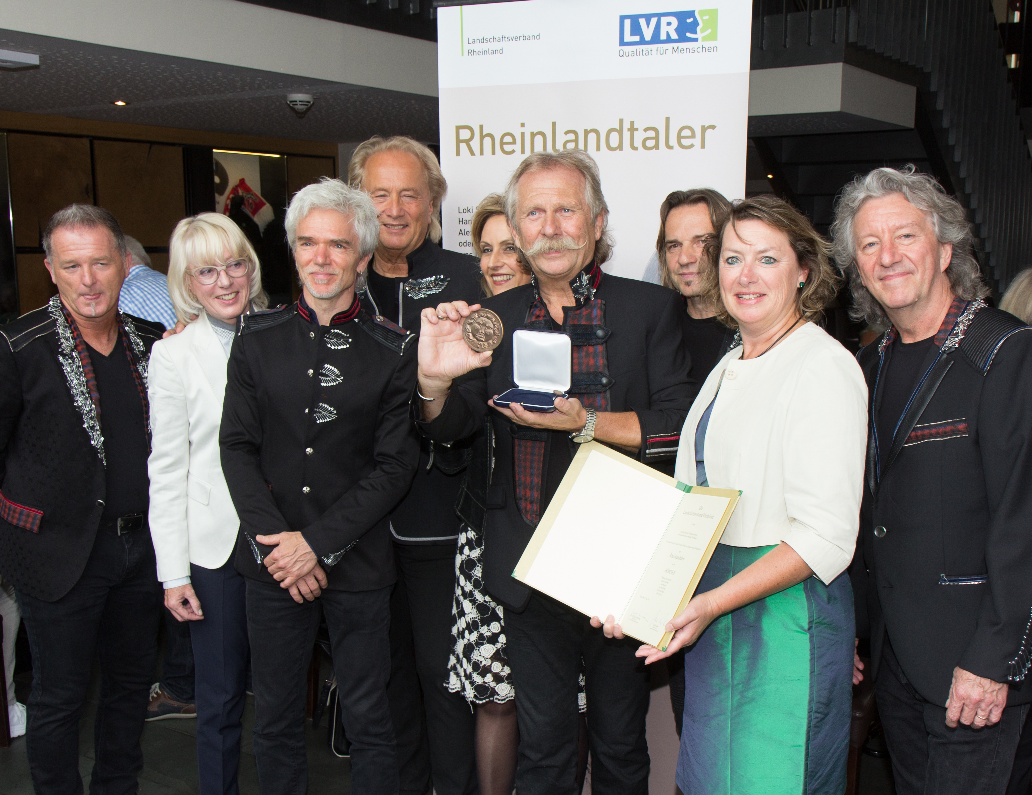 Verleihung des Rheinlandtalers des LVR an die Höhner. v.l.n.r Micki Schläger, Elfi Scho-Antwerpes (erste Stellvertreterin der Oberbürgermeisterin). Wolf Simon, Hannes Schöner, Ulrike Lubek ( LVR-Direktorin), Henning Krautmacher, Jens Streifling, Anne Henk-Hollstein (stellv. Vorsitzende der Landschaftsversammlung Rheinland), John Parsons